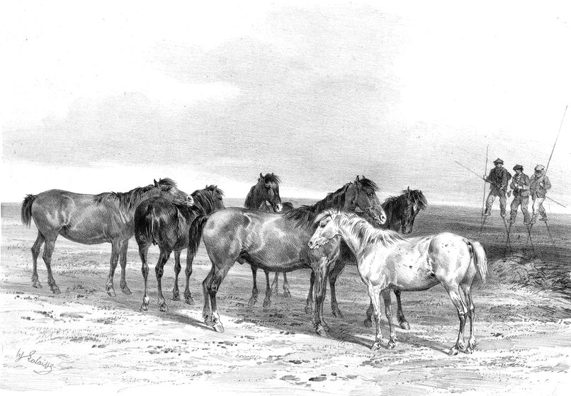 Chevaux de race landaise (vers 1850)